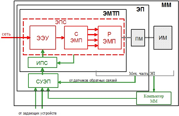 электромеханотронный преобразователь, электропривод и мехатронный модуль